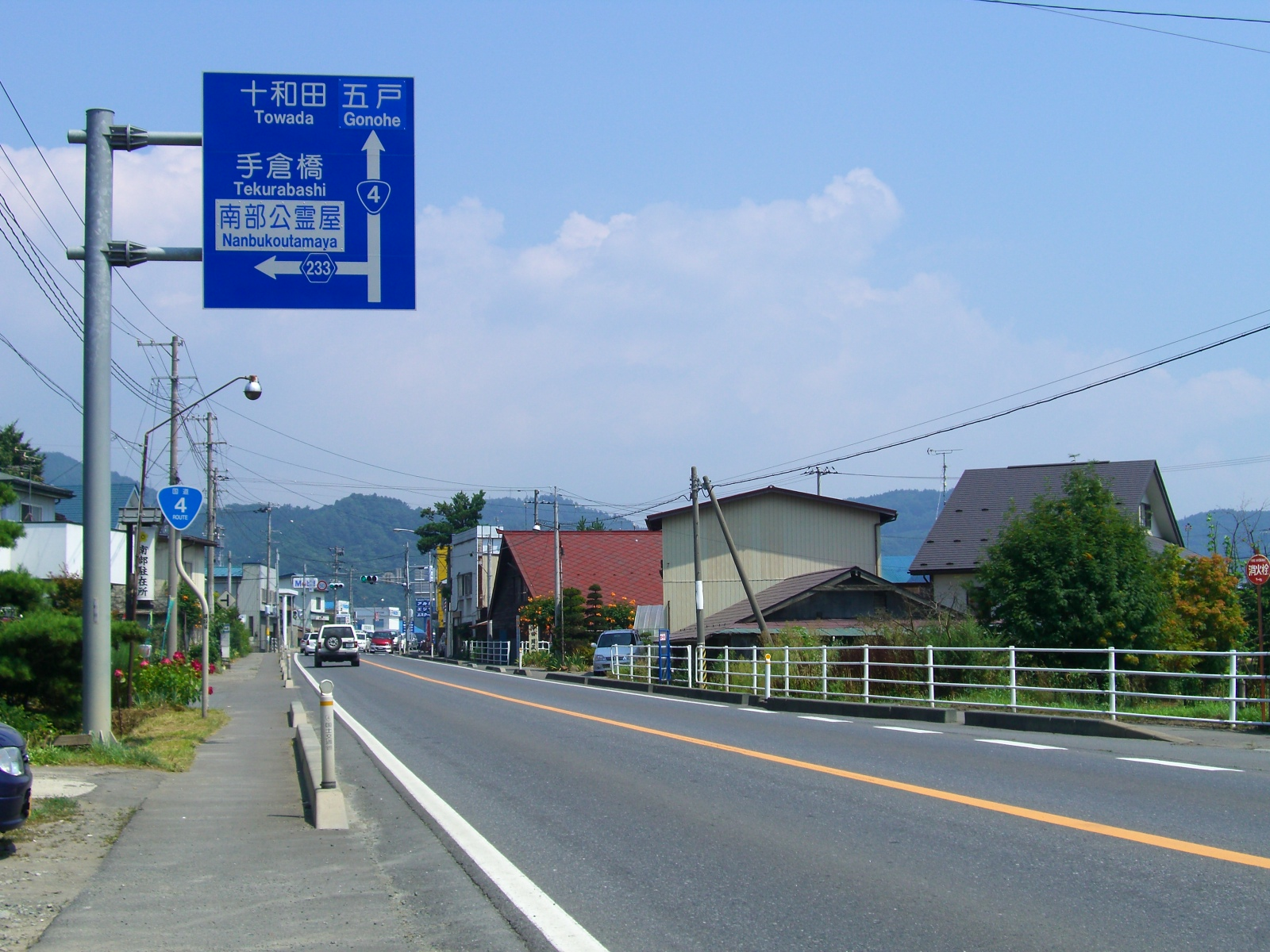 青森県南部町内（国道104号重複区間）